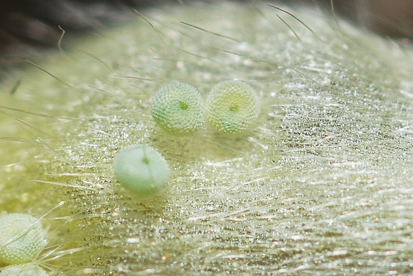 Cupido minimus eggs